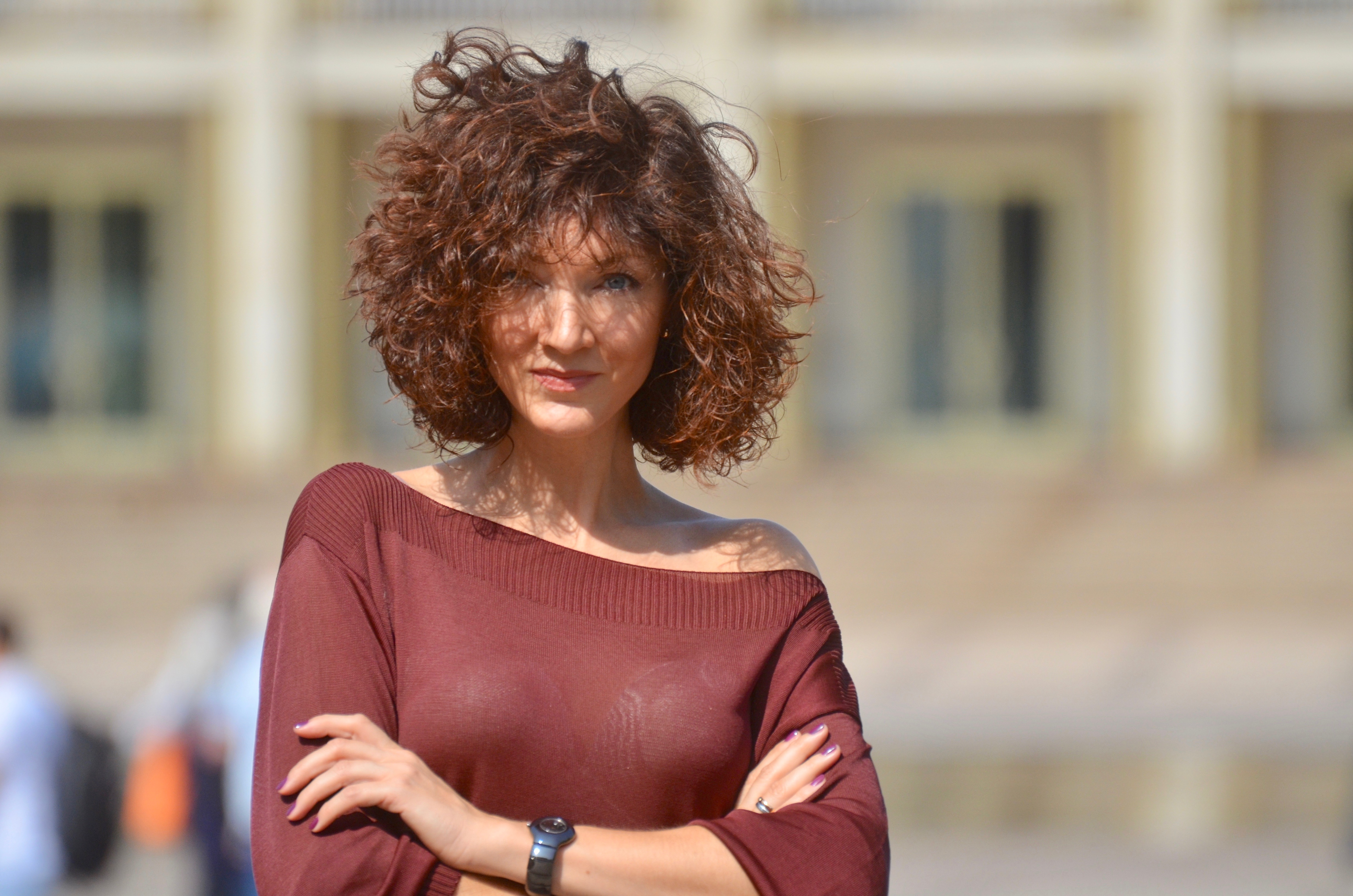 Deutschpop-Sängerin NEA! 2018 in Leipzig